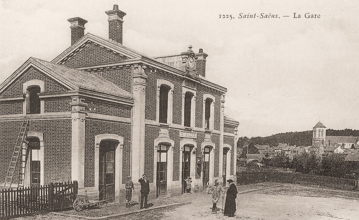 Carte postale ancienne éditée par lombard, N°1225 Gare de Saint-Saëns sur la Ligne Montérolier-Buchy - Saint-Saëns